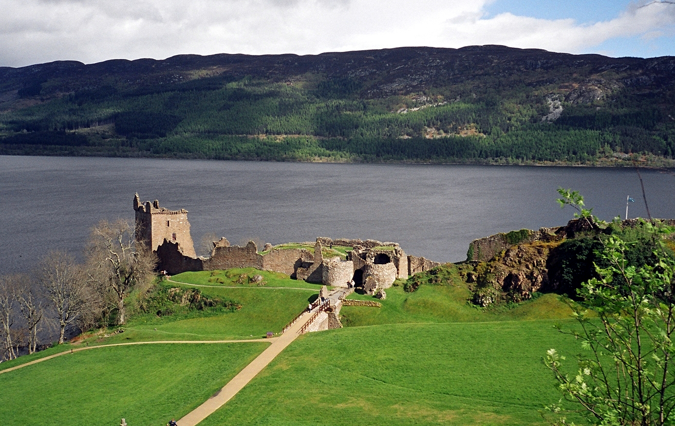 Urquhart Castle